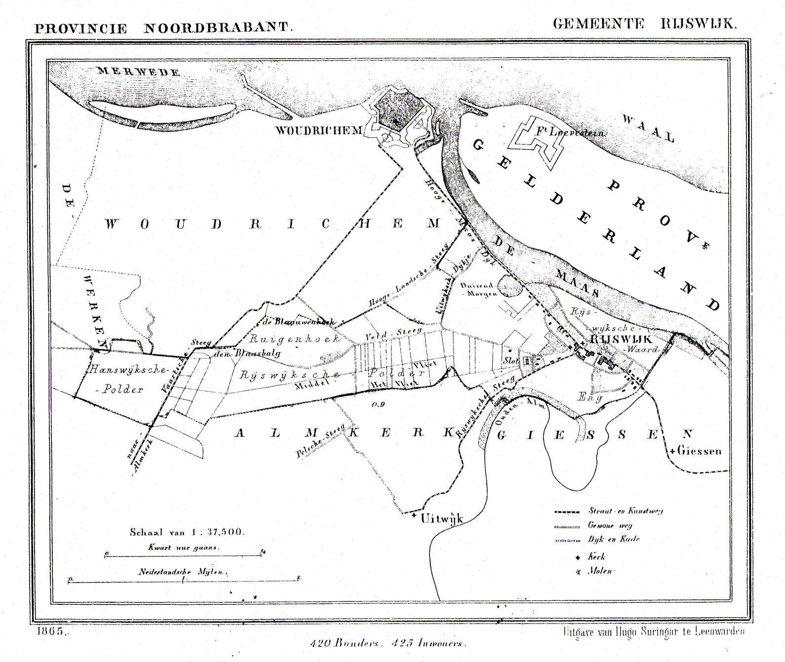 Nederland, Noord-Brabant, Gemeente Rijswijk